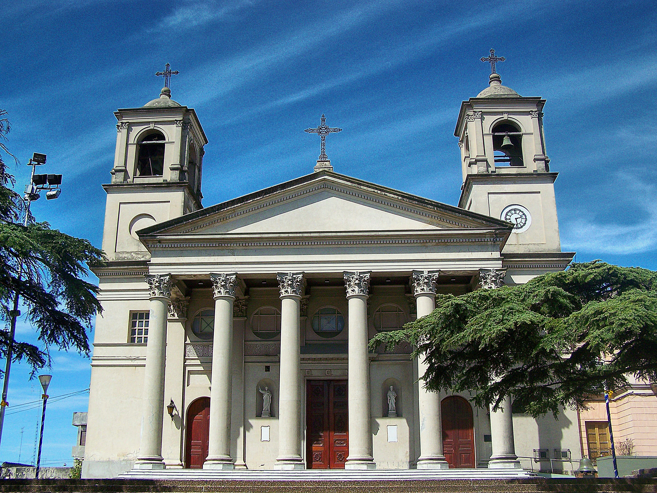 Basílica de Nuestra Señora y San Benito de Palermo con su equipamiento.. Ubicada en el departamento de Paysandú